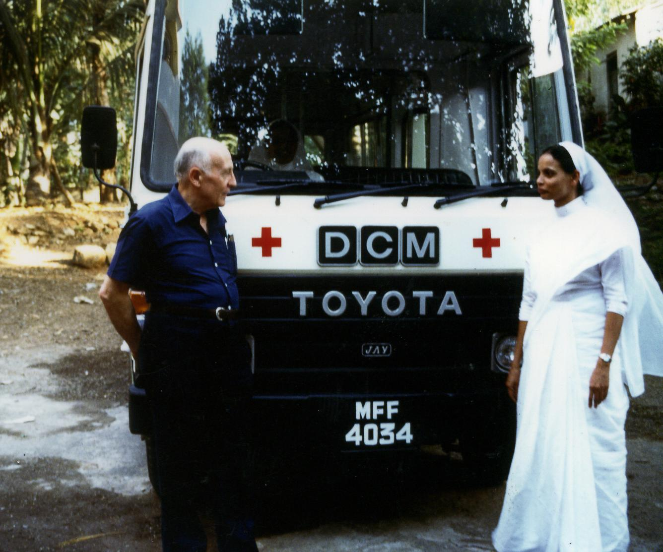 Antonio Maria Alessi, e suora del sorriso